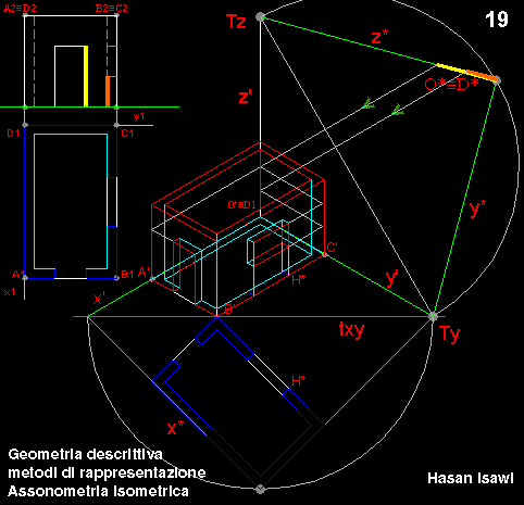 Assonometria Isometrica, disegno eseguito durante il corso di geometria descrittiva alla facoltà di architettura Valle Giulia, all`università Sapienza di Roma